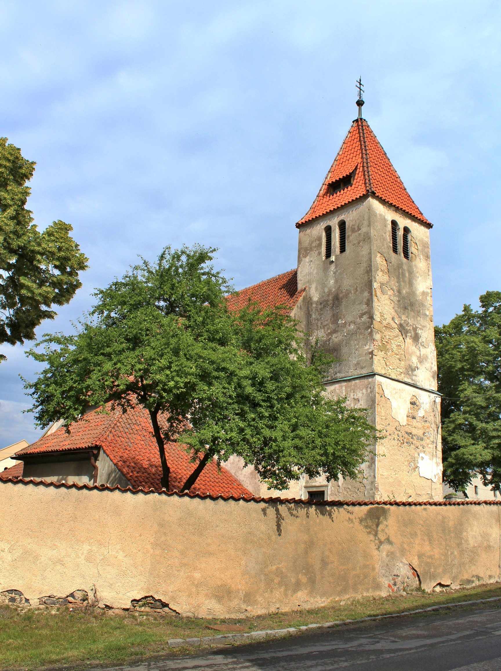 Kojetice kostel sv. Víta